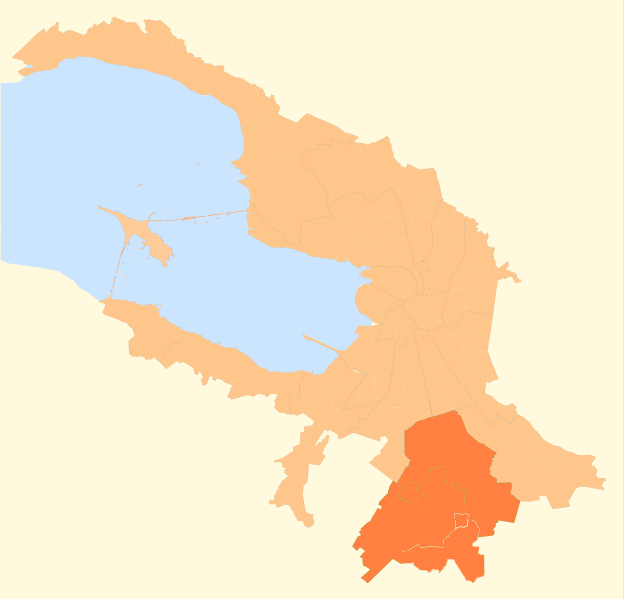 Карта Пушкинского района (включая Павловск)